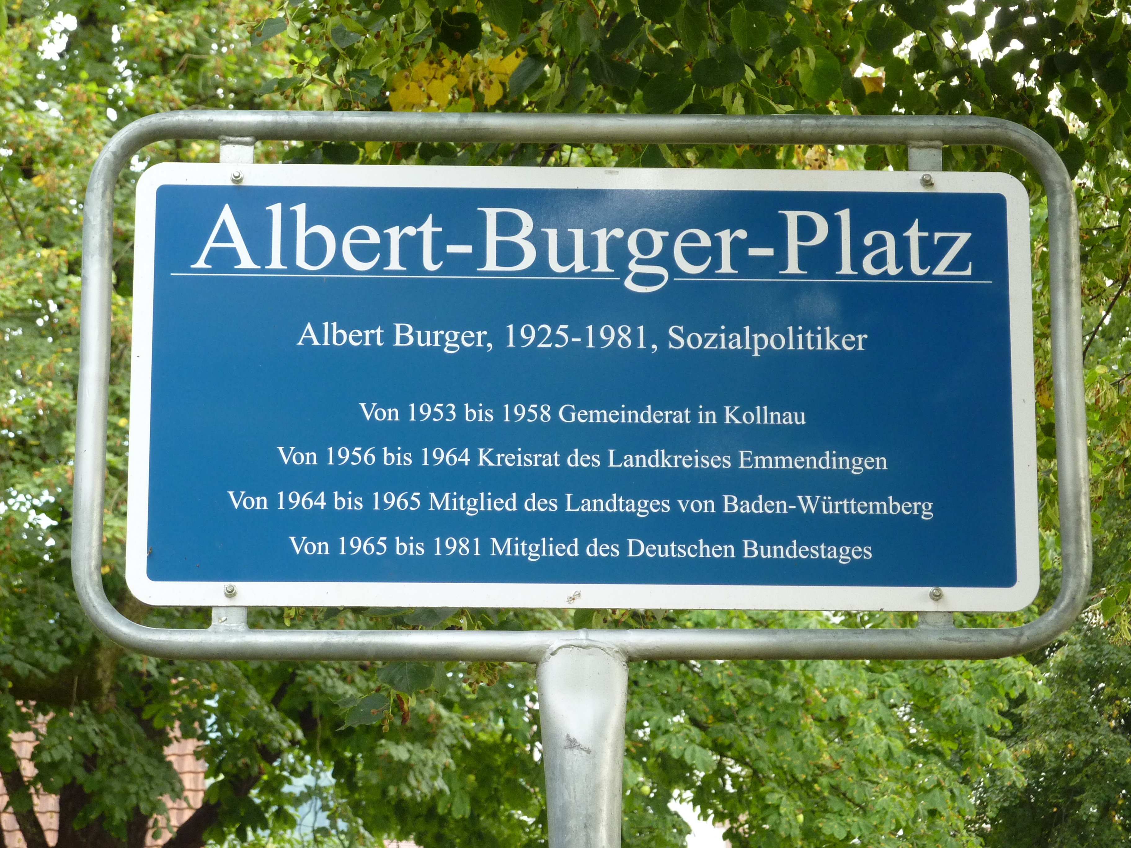 Schild auf dem Albert-Burger-Platz westlich des Rathauses in Kollnau